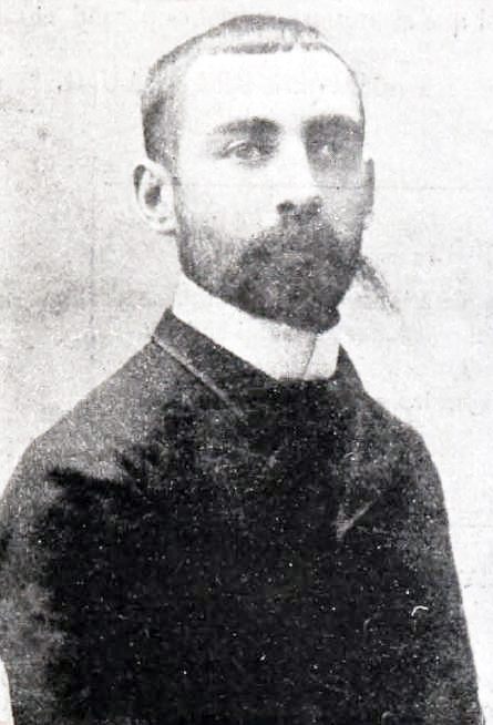 Foto del poeta y periodista chileno Pedro Antonio González (1863-1903) tomada en 1886.